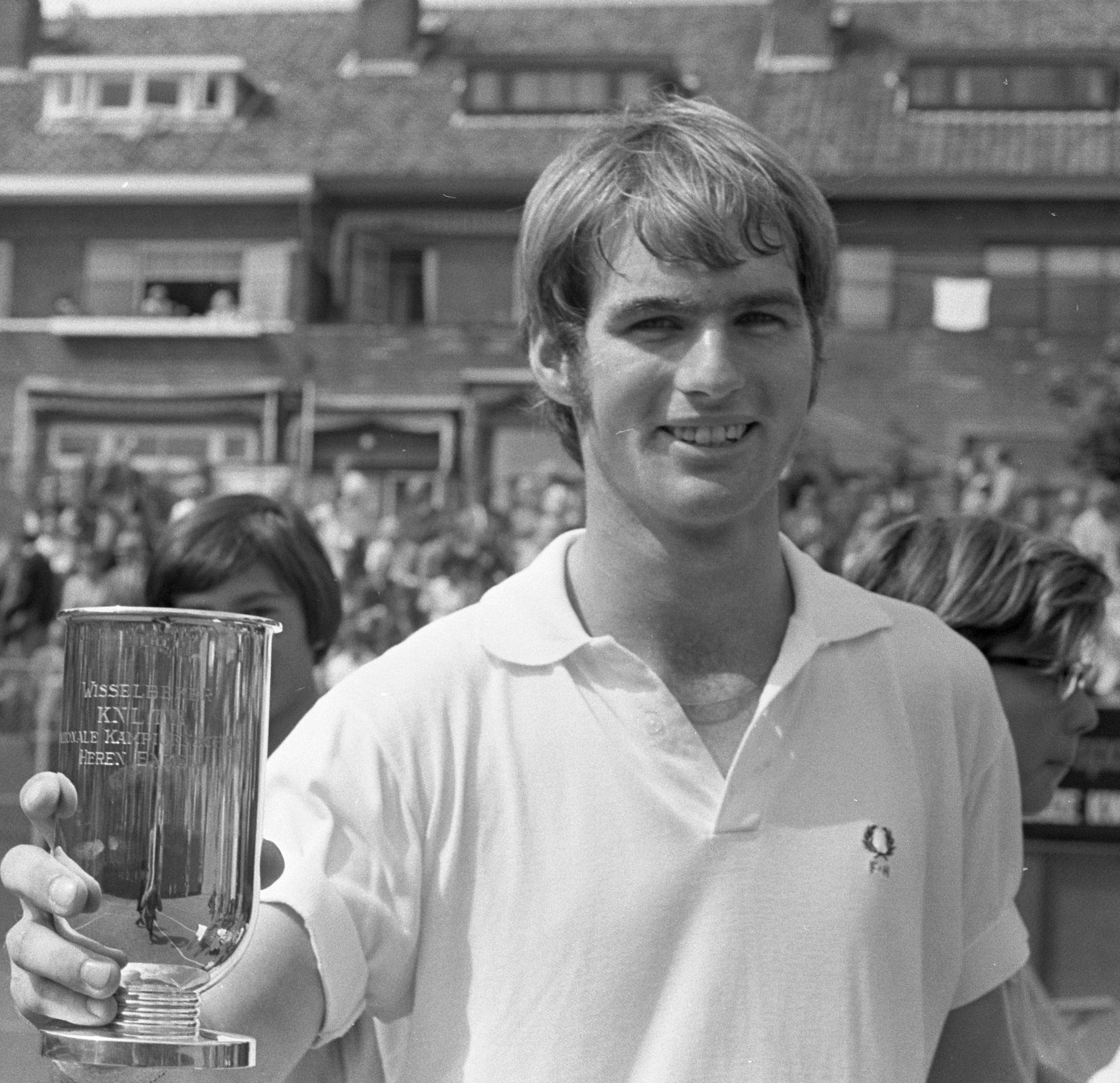 Nederlandse tenniskampioenschappen 1971 Scheveningen, Fred Hemmes met beker